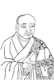 Ashvaghosha, autore buddhista Mahayana del II secolo, patriarca delle scuole Tiantai e Chan in un antico dipinto.